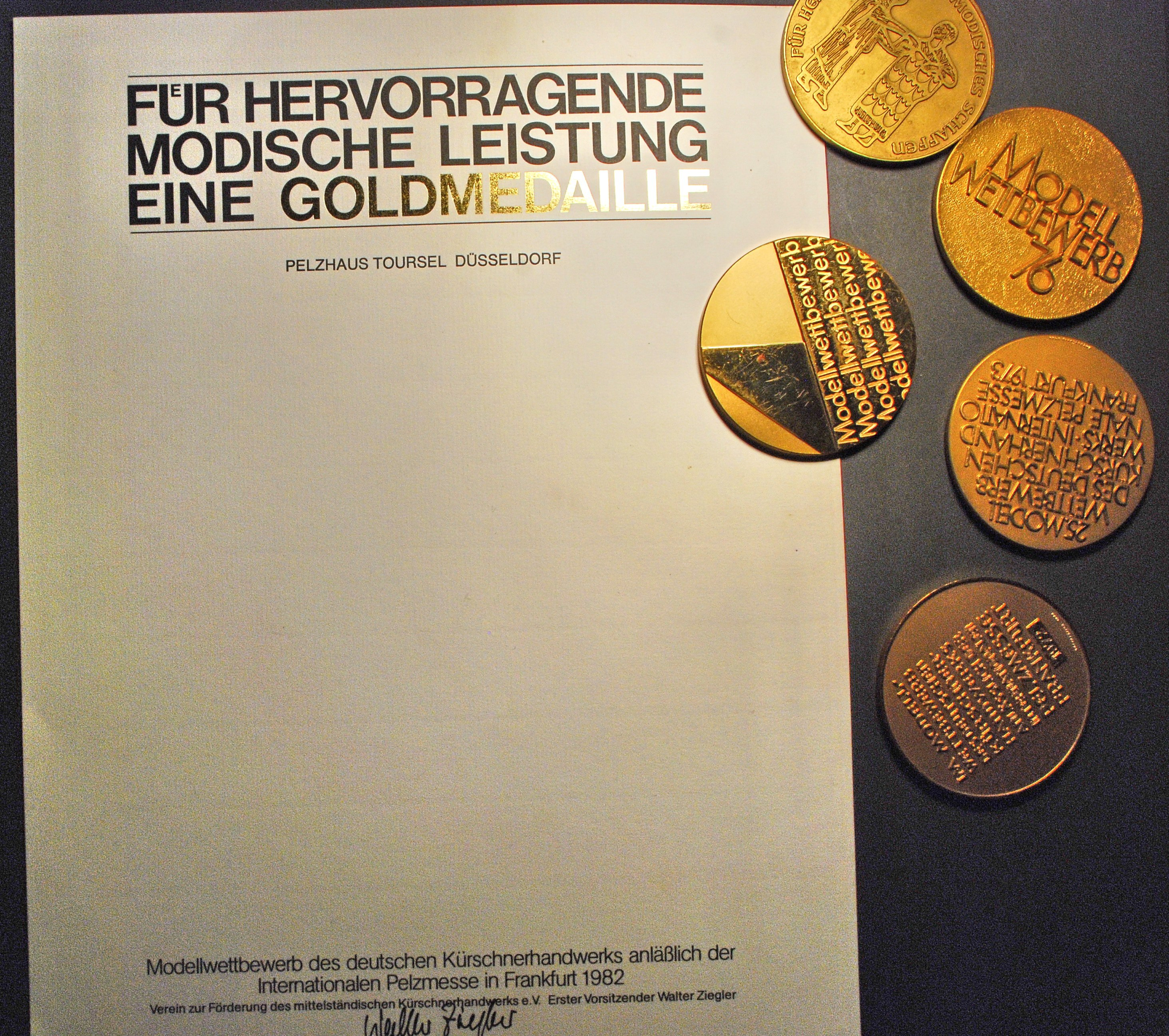 Bilder aus der Firmengeschichte der Kürschnerfamilie Toursel. Pelzgeschäft Rudolf Toursel, Düsseldorf, Kölner Straße 63. Fünf Goldmedaillen und eine dazugehörende Urkunde (Unterschrift Walter Ziegler, Firma Geng, Mannheim) des Modellwettbewerb des deutschen Kürschnerhandwerks.